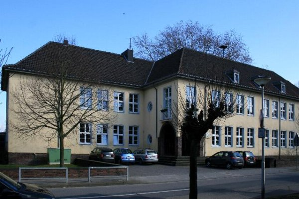 Denkmal Nr. 409 in Viersen-Bockert